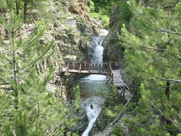 Екопътеката в с. Загражден